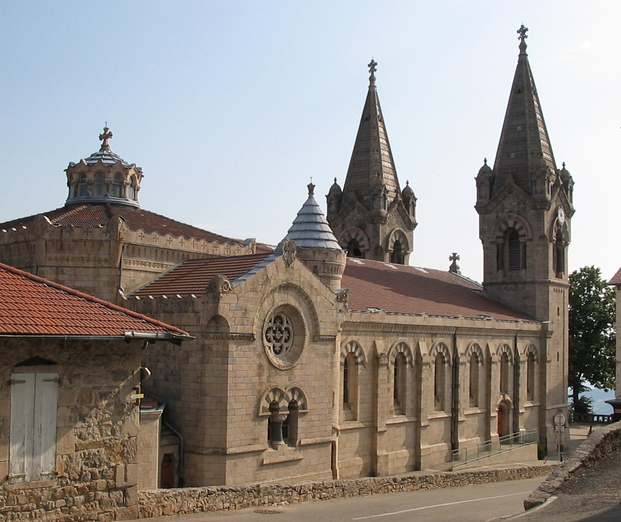 Basilique Saint Jean-Francois Régis de Lalouvesc